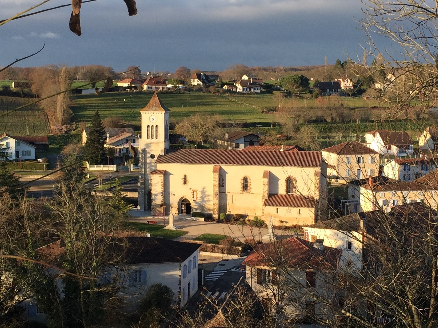 Eglise de Sault-de-Navailles vue du château